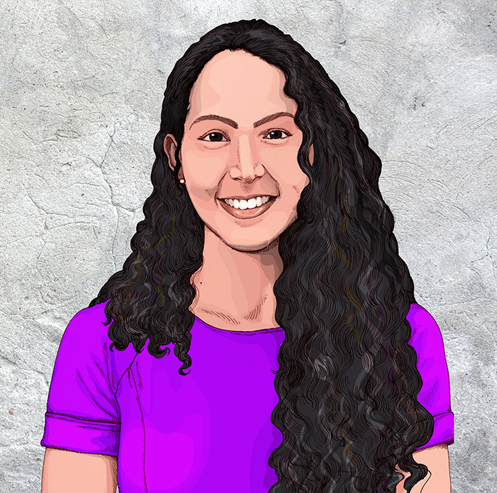 Defensora de derechos humanos y presa de conciencia